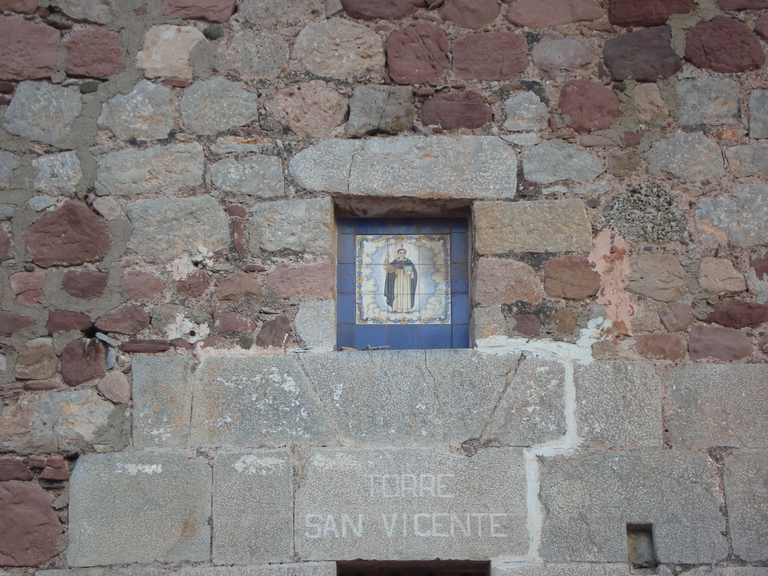 Torre de costa de Benicasim/Benicàssim